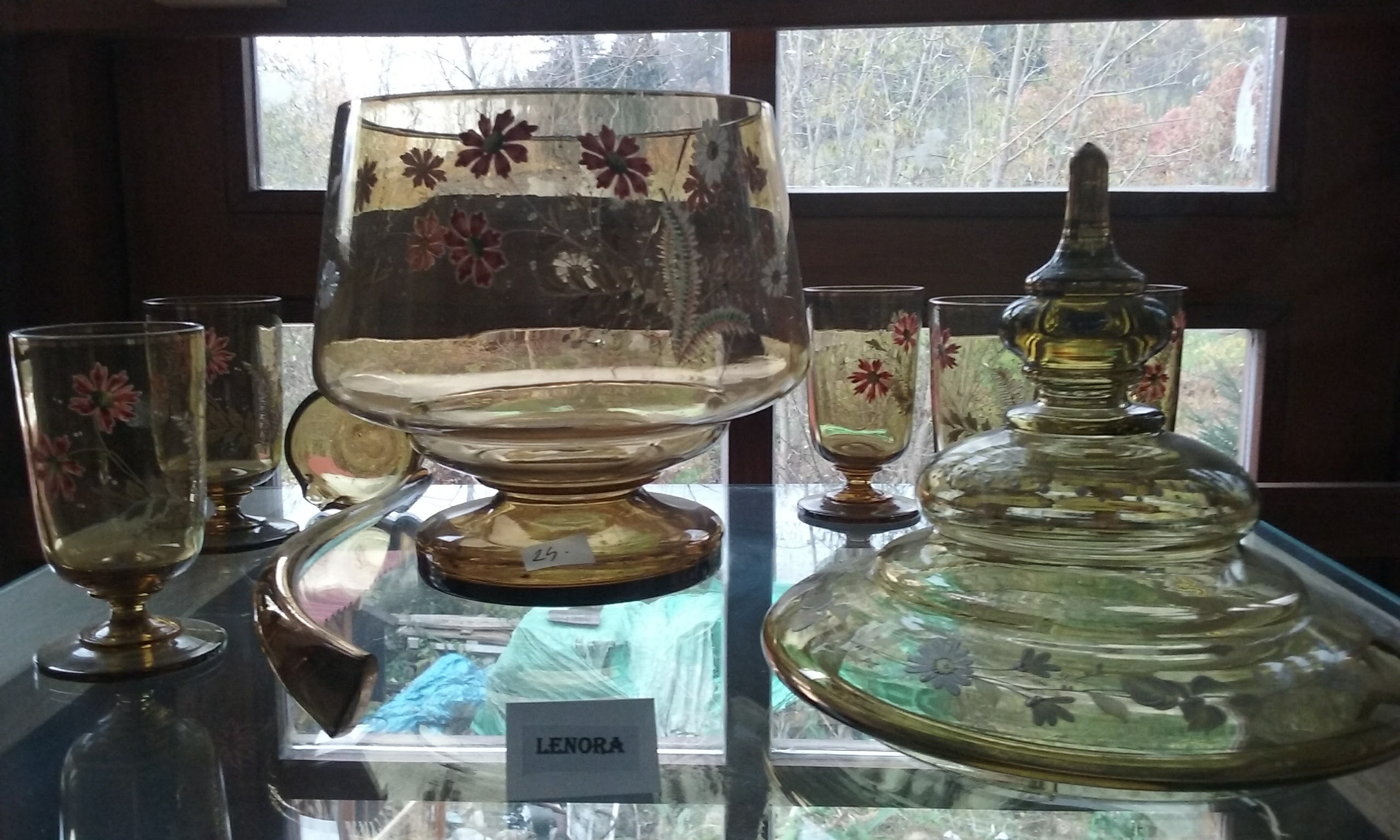 Brusírna Rajsko. Okres Klatovy, Česká republika.